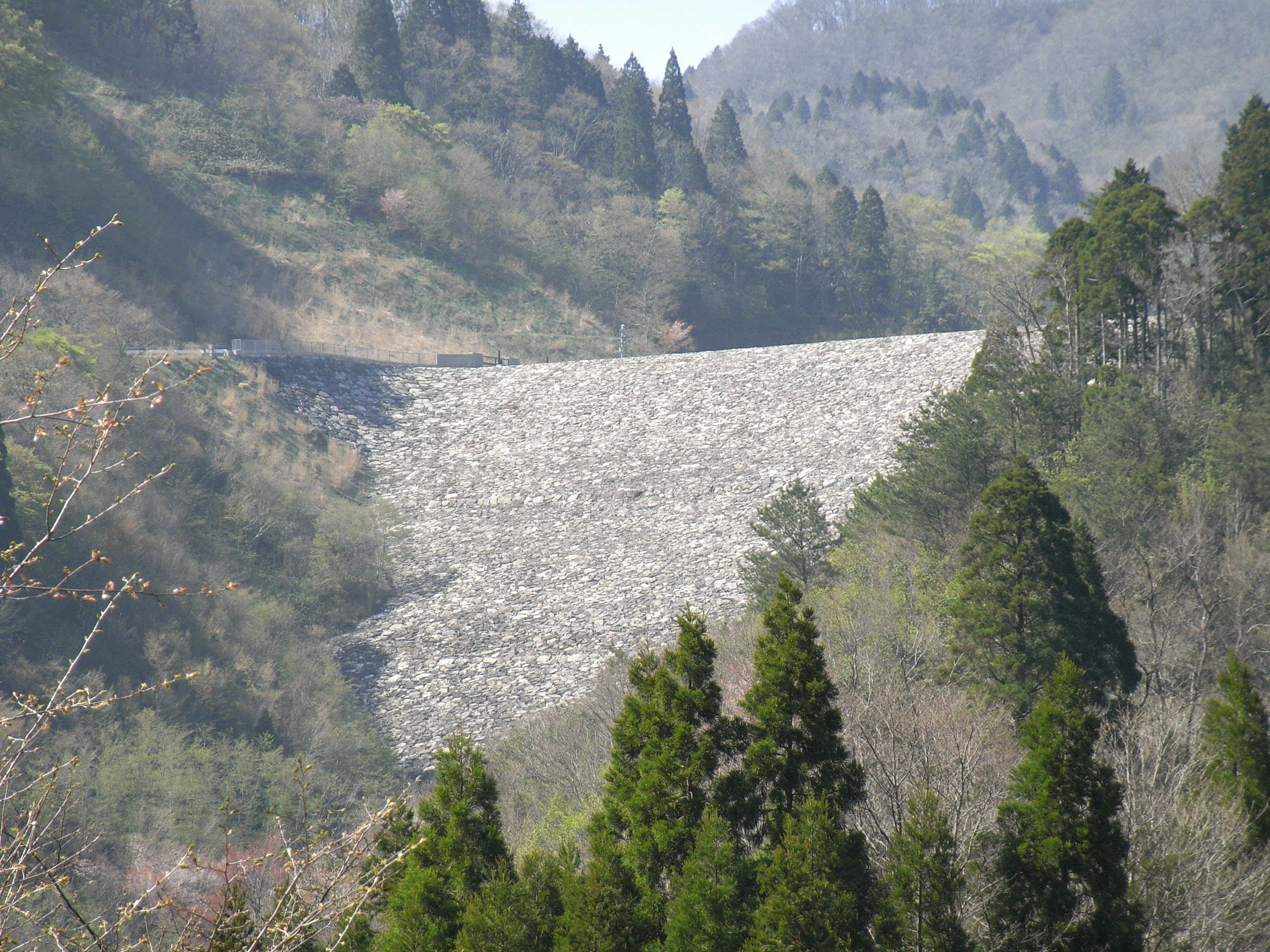 Dam